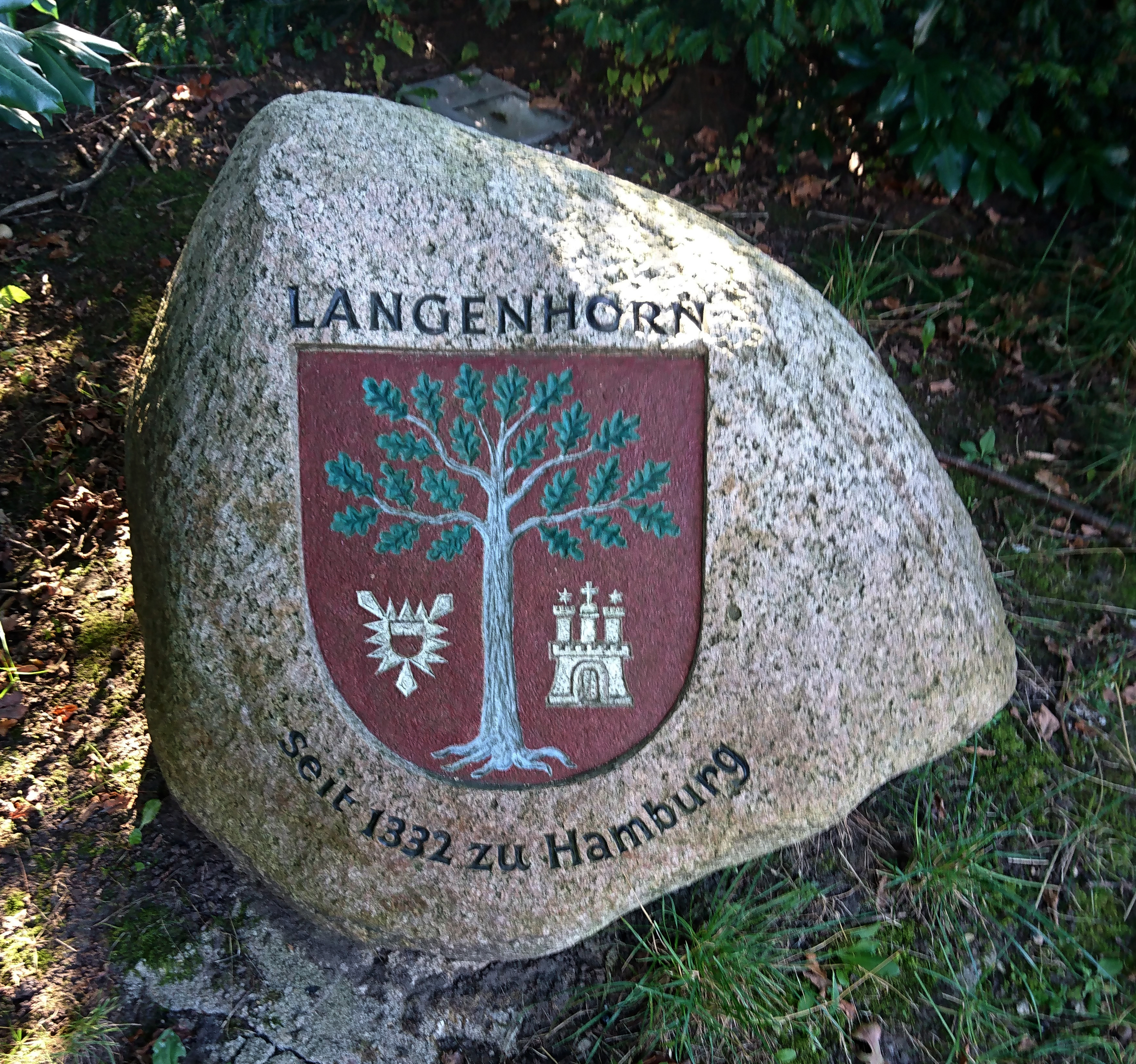 Am 9. August 2013 wurde anlässlich der Jubiläumsfeier, zu der einhundertjährigen Zugehörigkeit zu Hamburg als Stadtteil, bei der Friedenseiche an der Langenhorner Chaussee 155, gegenüber der Einmündung zur Tangstedter Landstraße, der Langenhorner Wappenstein enthüllt. Der Wappenstein ist ein Findling, in dem der Bildhauer Hans Joachim Keibel des Steinmetzbetriebes Westphely und Malota, Hamburg-Ohlsdorf, das Langenhorner Wappen hereinarbeitete. Wappenentwurf: Günter Brede, Grafiker und Heraldikkenner.